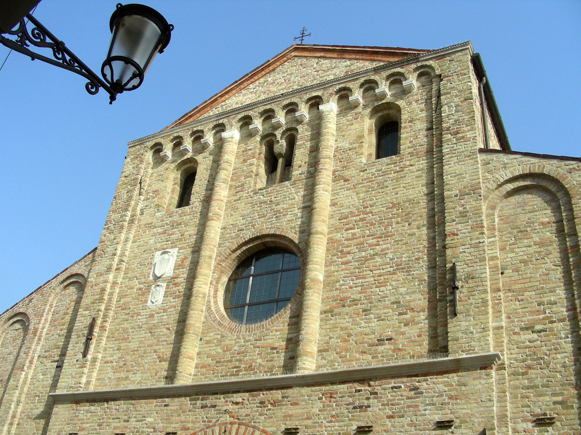 Italia, Veneto, Padova, chiesa di Santa Sofia , facciata, parziale